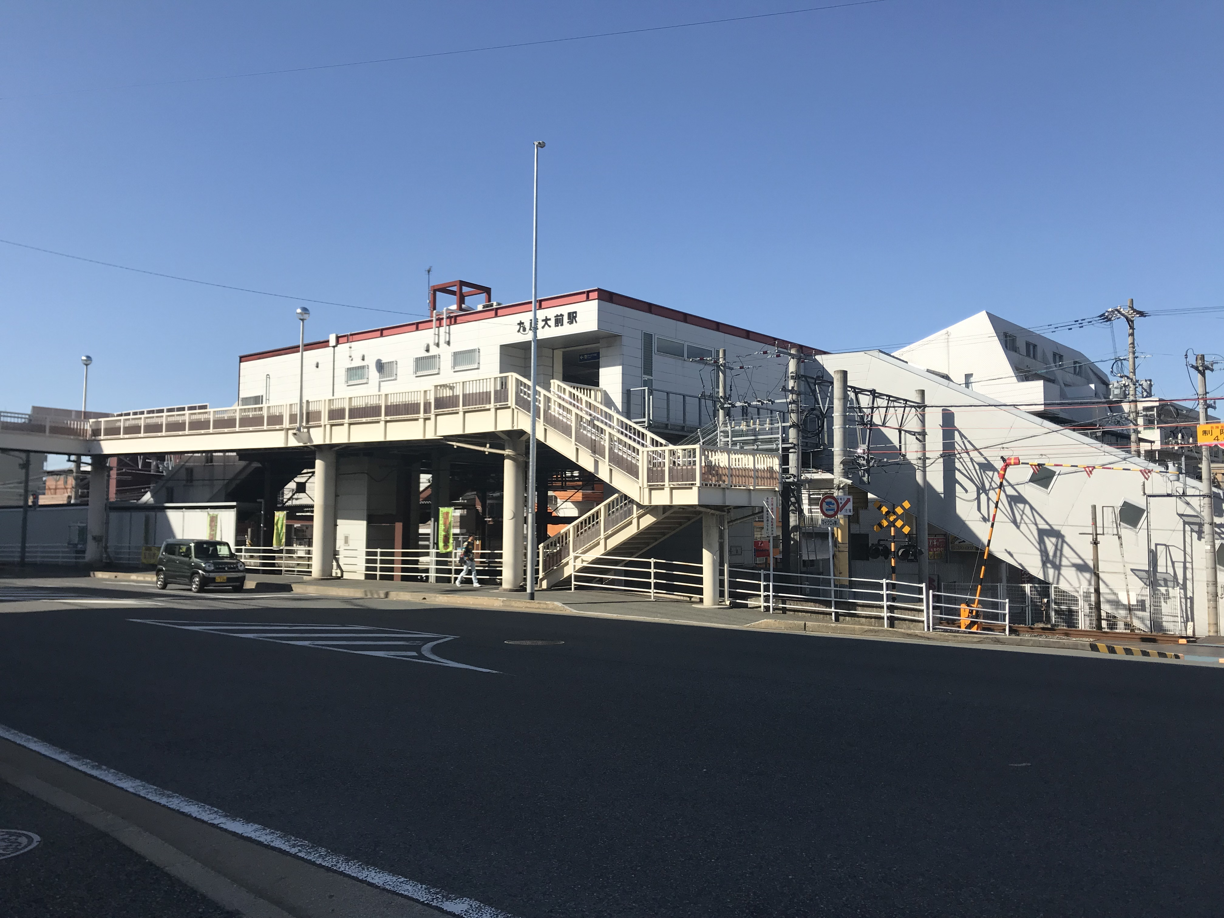 九産大前駅の駅舎